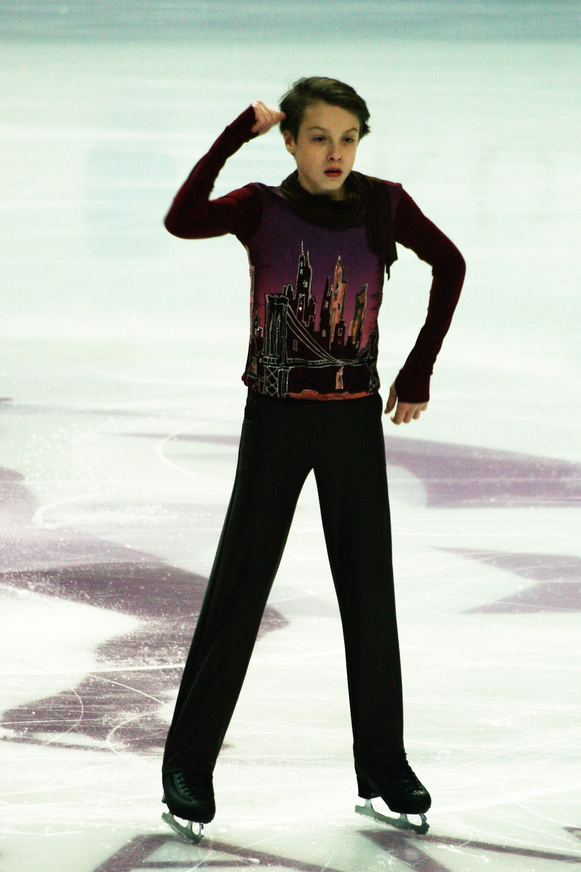 Илья Скирда (Россия) на финале Гран-при по фигурному катанию среди юниоров 2016-2017